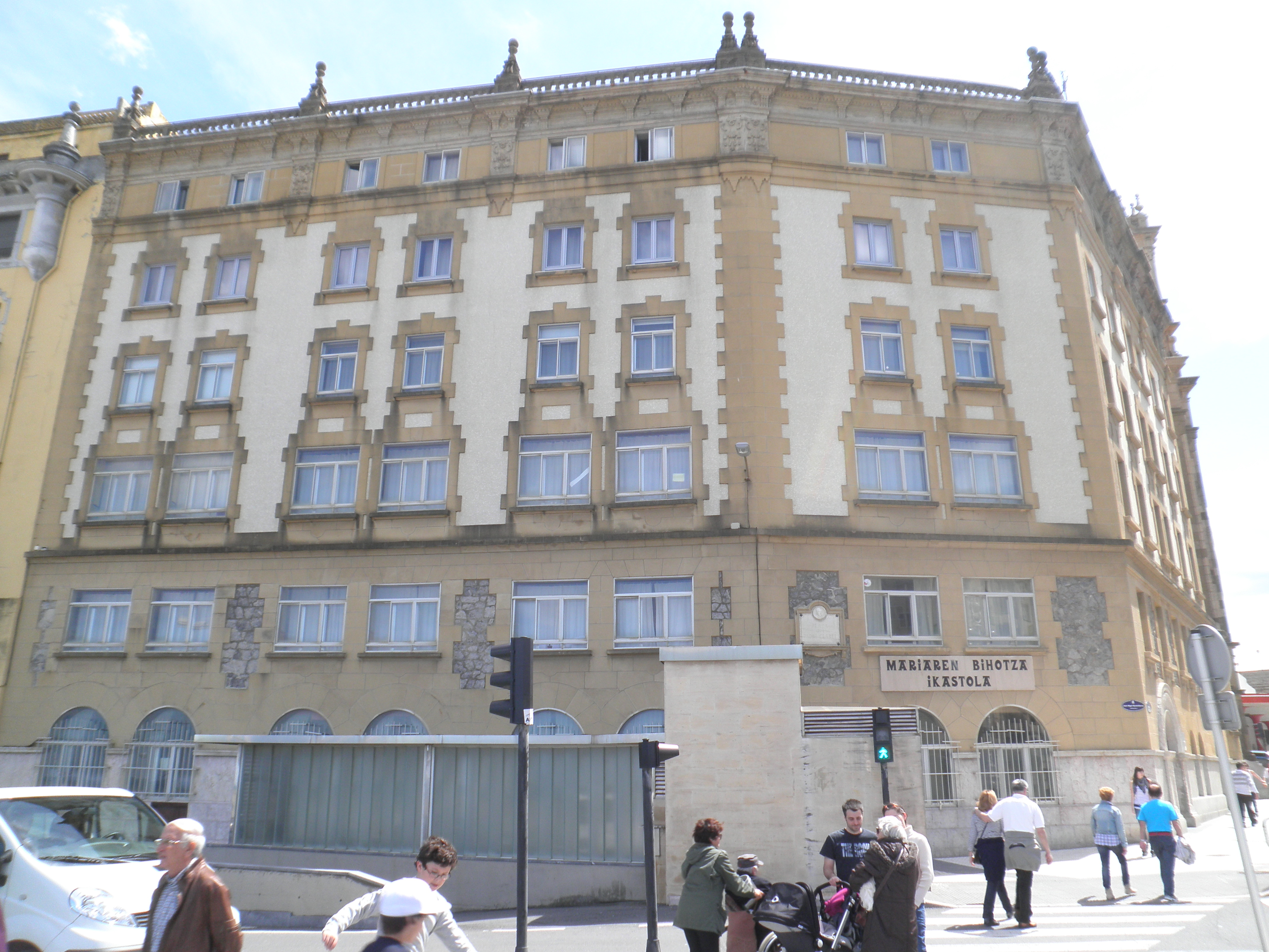 Mariaren bihotza ikastola, Donostiako Gros auzoan.